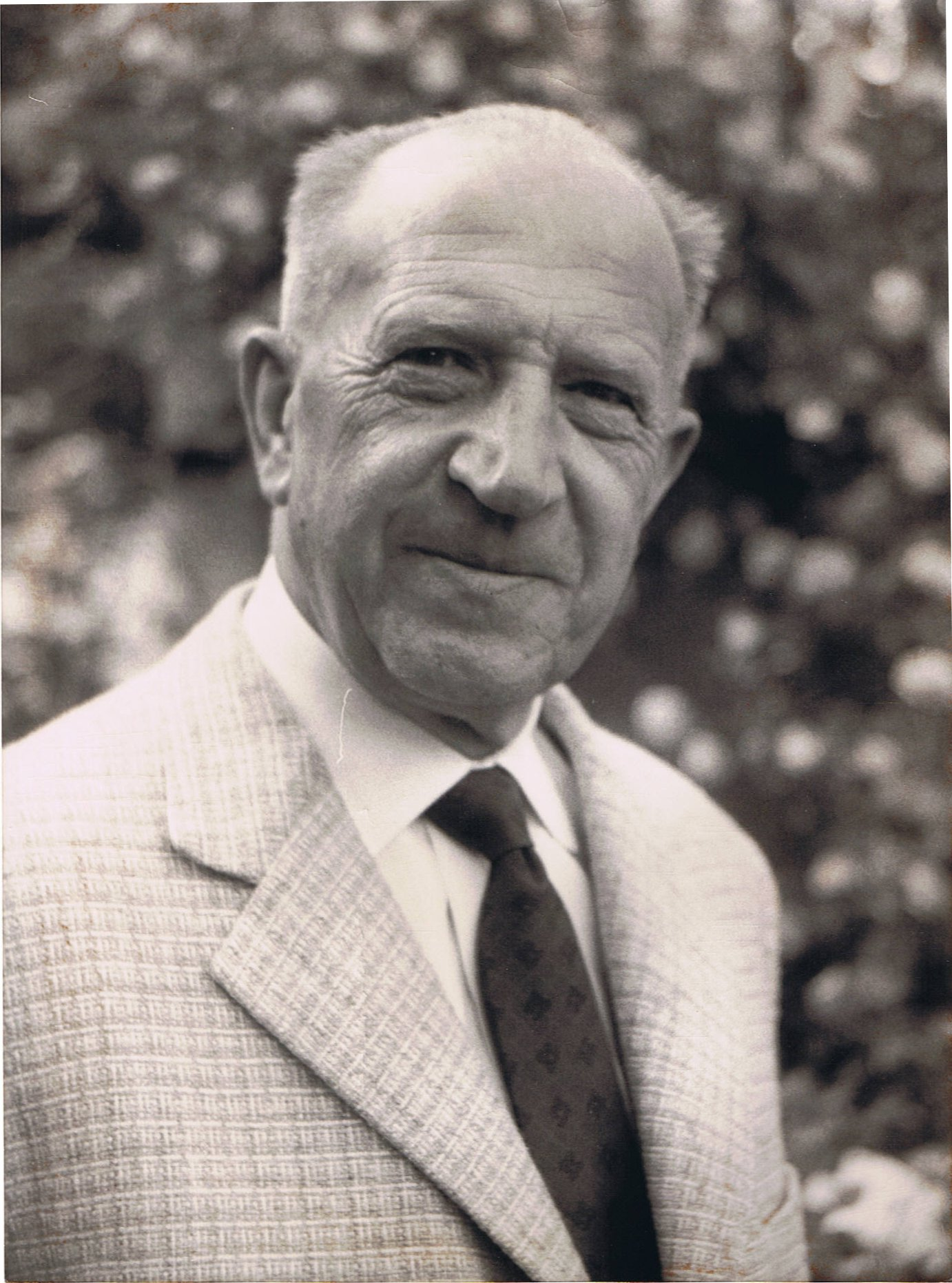 Gustav Großman